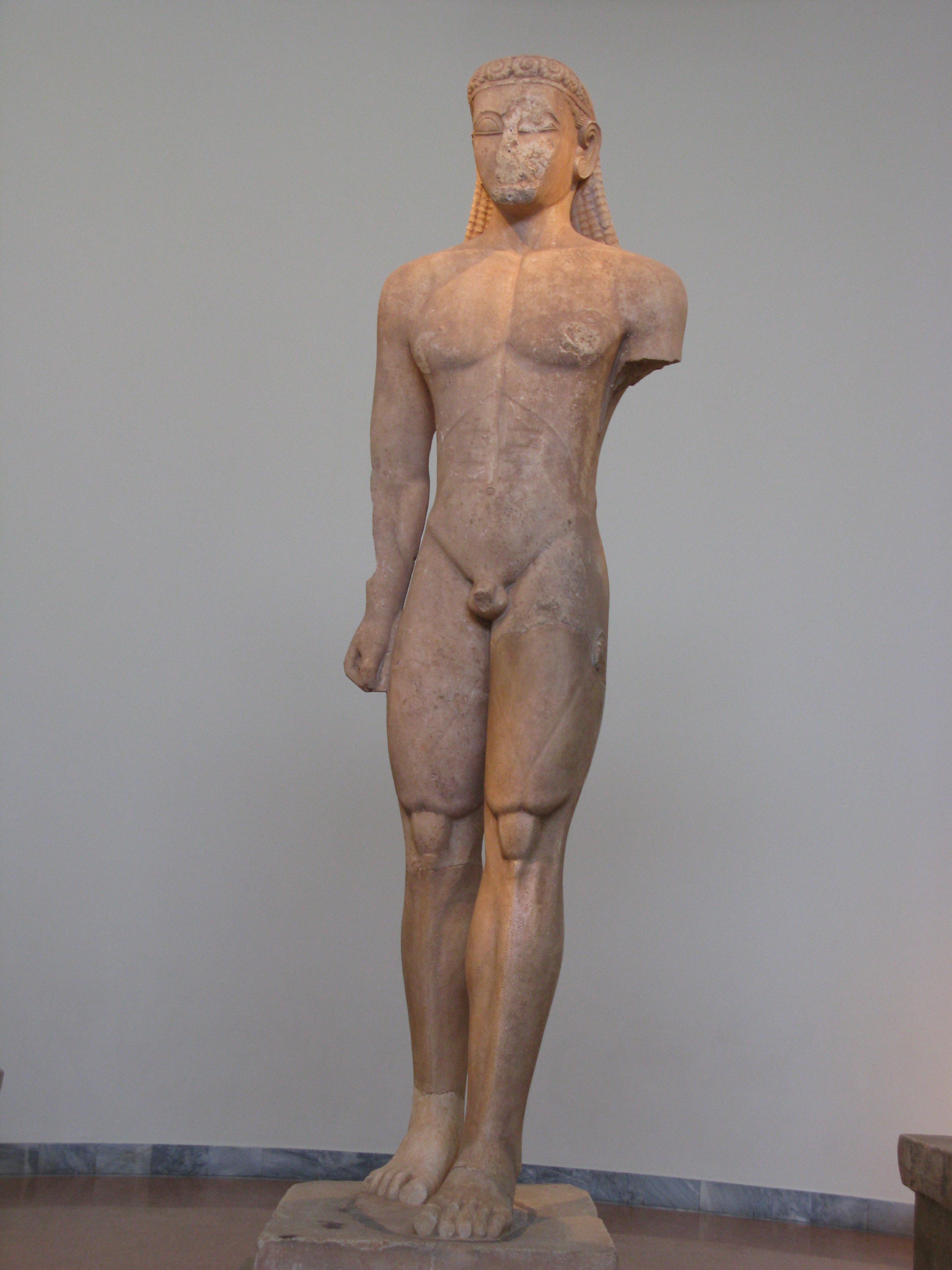 National Archaeological Museum. Athens, Greece. --- Εθνικό Αρχαιολογικό Μουσείο. Αθήνα.